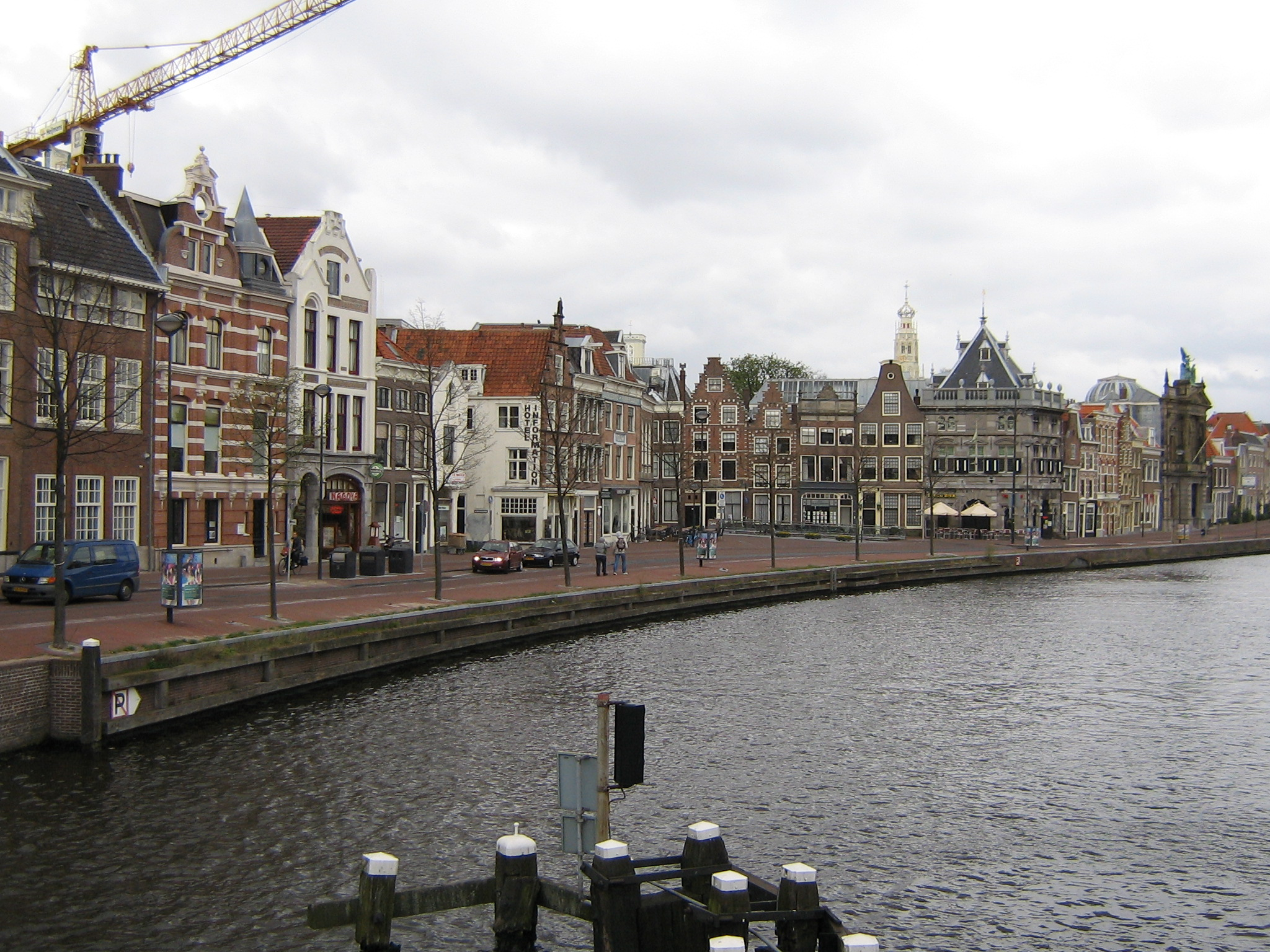 Haarlemse herenhuizen aan het Spaarne. Haarlem, Netherlands: Gentlemen's houses at the river Spaarne.